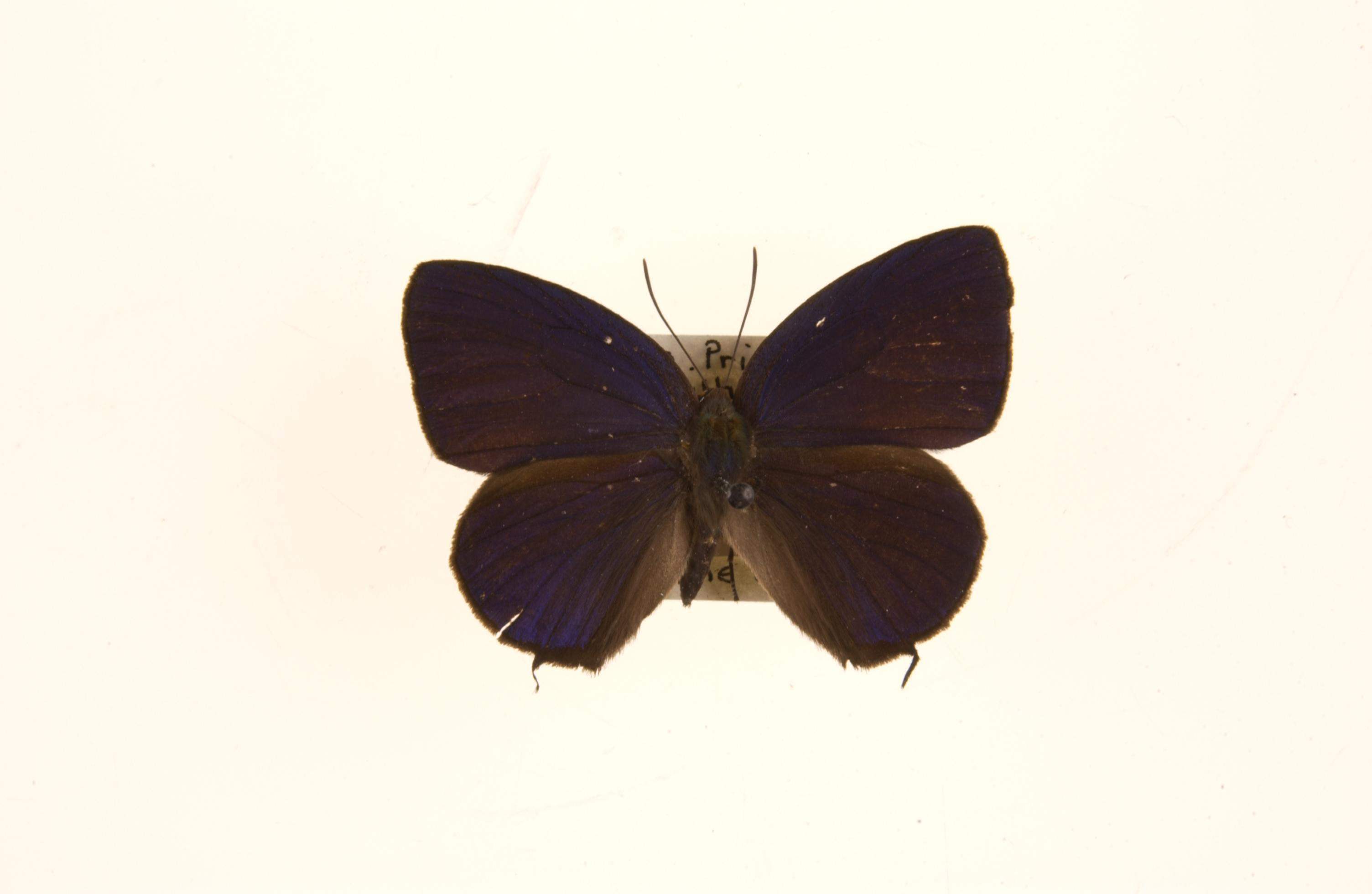 Arhopala agrata female